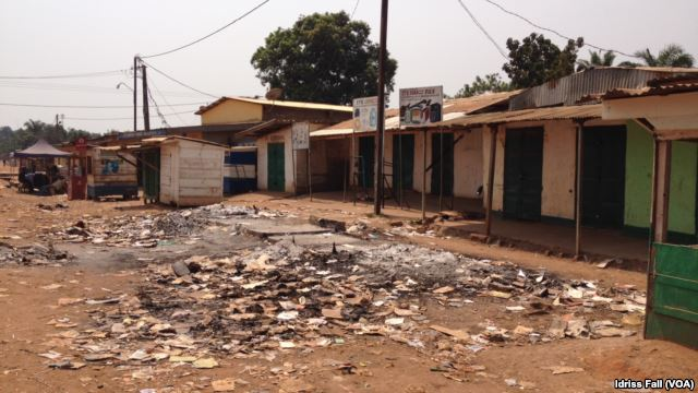 Restes d'une boutique au marche km5. Bangui, 22 décembre 2013.